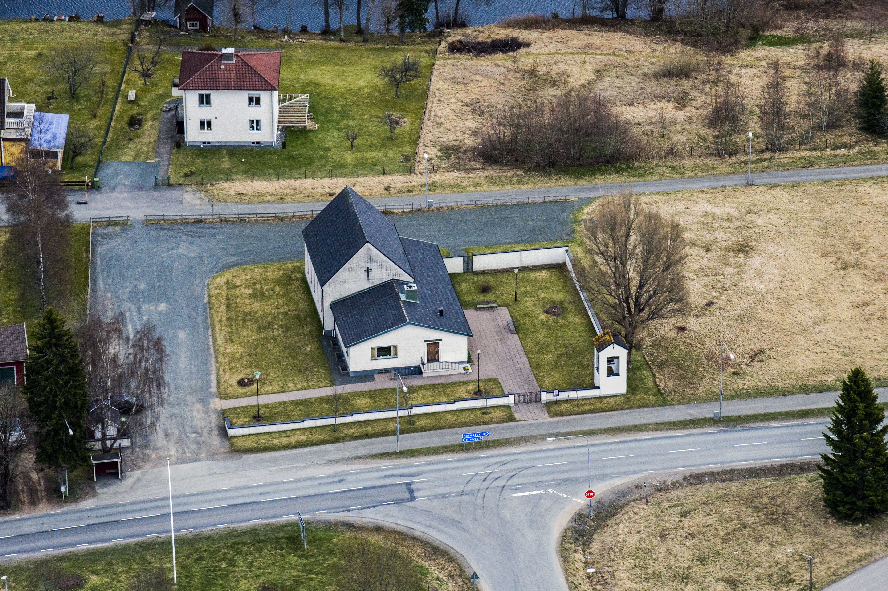 Fredriksdals kyrka